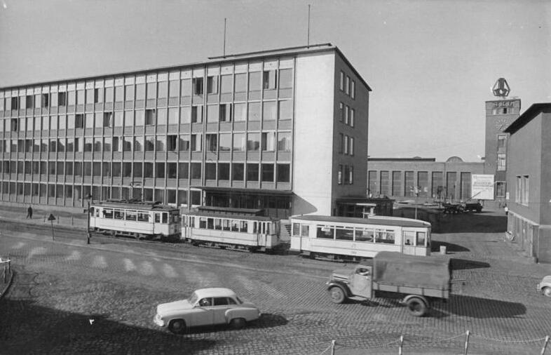 Magdeburg, VEB Schwermaschinenbau Zentralbild Biscan Sta. 7.5.1963 Ein moderner Industriebau entstand in Magdeburg mit dem Konstruktionsgebäude des volkseigenen Schwermaschinenbaubetriebes "Karl Liebknecht". Der vom VEB Industrieprojektierung entworfene Bau besteht völlig aus Stahl, Beton und Glas. Für die Außenwände wurden Stahbetonfertigteile verwendet. Die großen sprossenfreien Verbundfenster mit Wendelflügel lassen das Tageslicht ungehindert an alle Arbeitsplätz. (unser Bild)